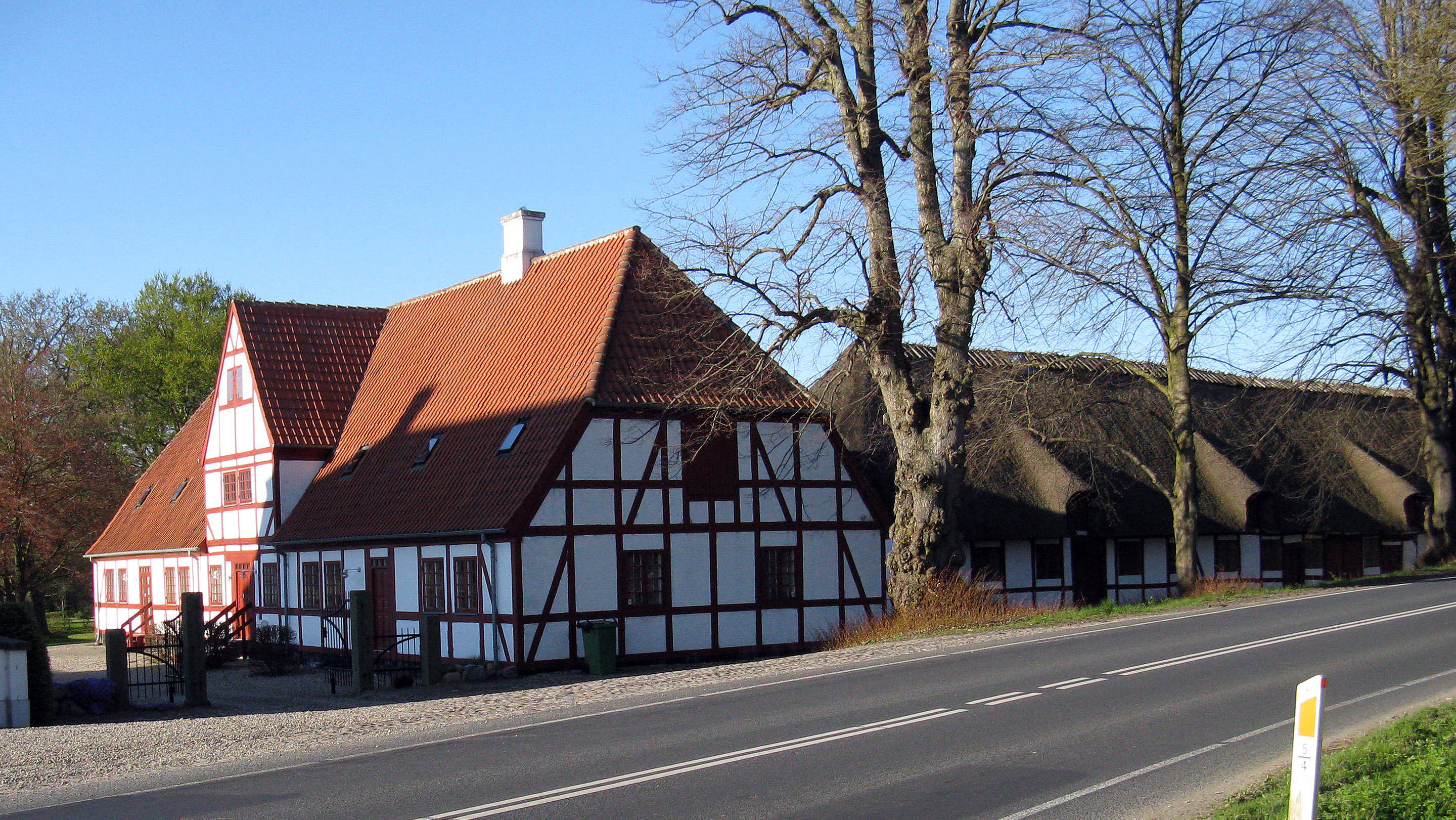 Hvidkilde, avlsgården. Egense Sogn, Sunds Herred, Svendborg Kommune på Fyn (Denmark).